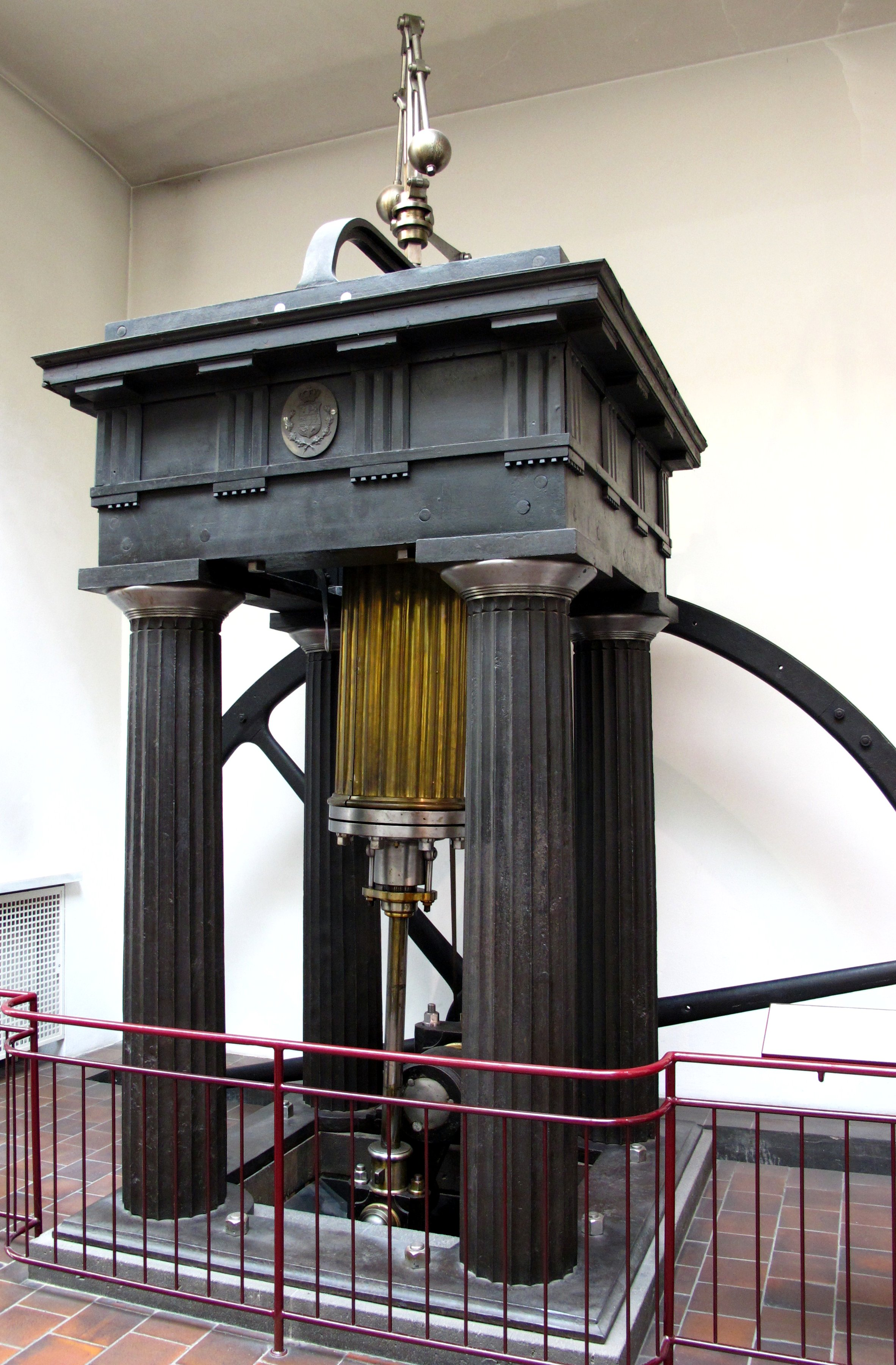 Hochdruck-Dampfmaschine mit schwingendem Zylinder. Langsam drehende Dampfmaschinen mit schwingenden Zylinder erlangten in der praktischen Anwendung keine große Bedeutung. Hersteller: Dr. Ernst Alban, Eisengießerei und Maschinenbauanstalt Güstrow, 1839 Kolbendurchmesser: 315 mm Kolbenhub: 860 mm Dampfdruck: 10 bar Drehzahl: 36 min−1 Leistung 21,9 kW